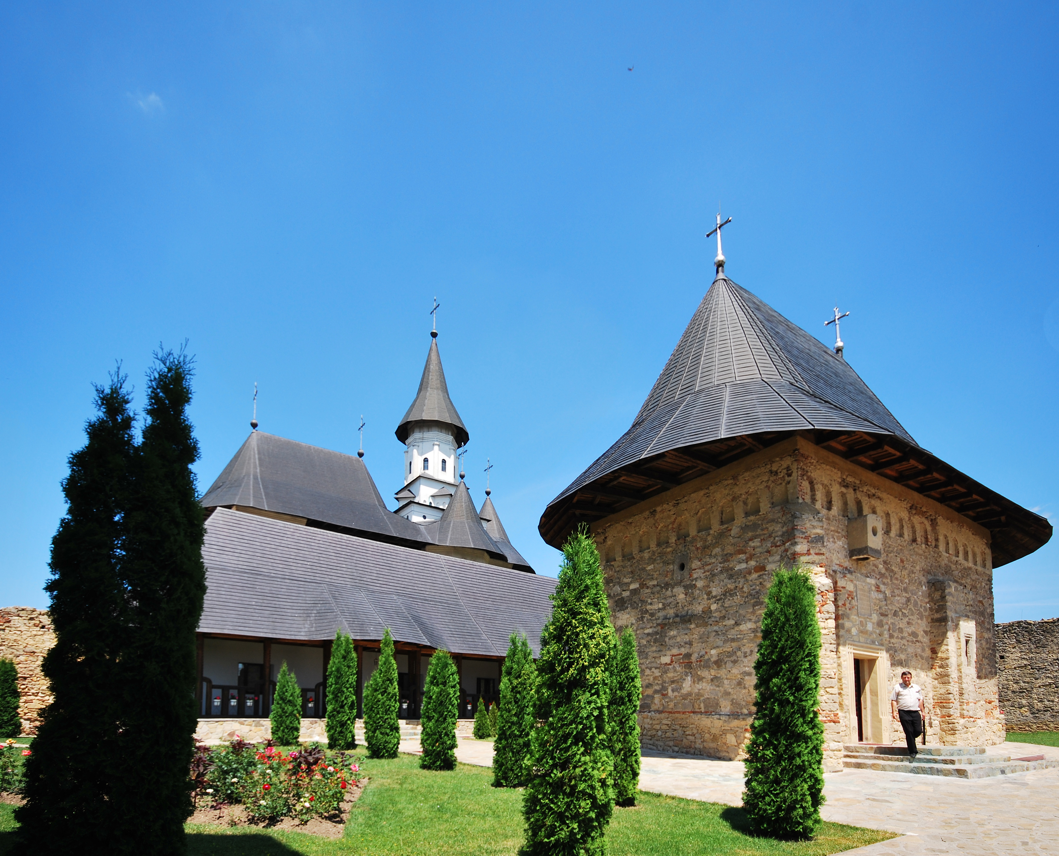 Biserica "Nașterea Maicii Domnului" 01